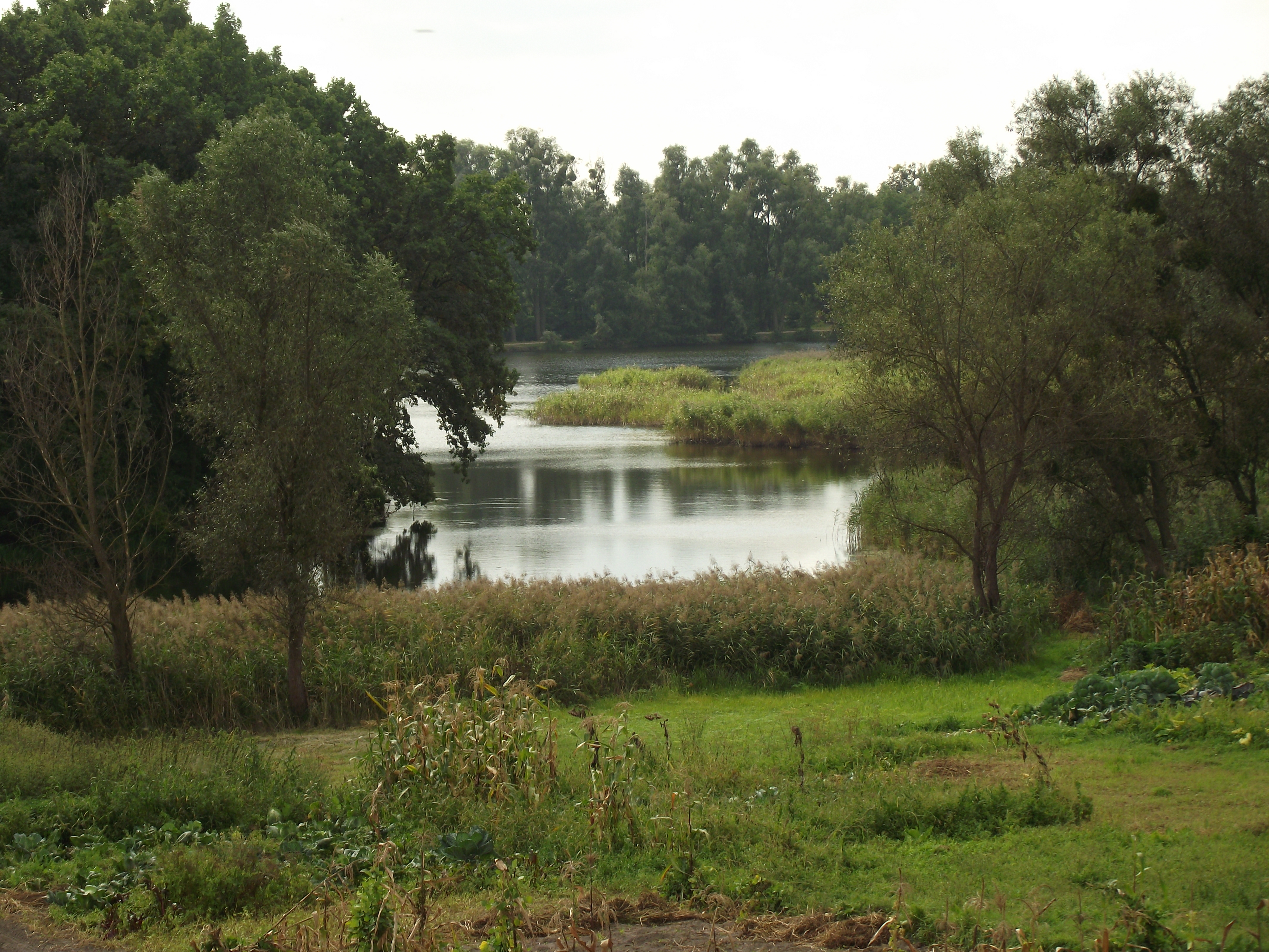 Лишня, річка Куделя.